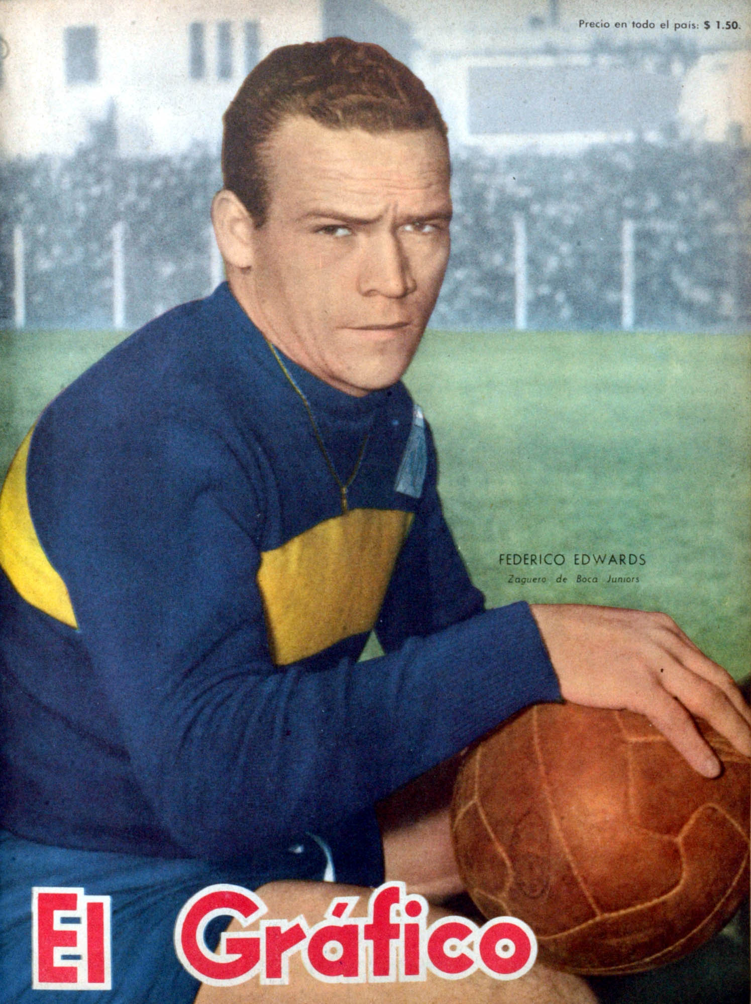 El Grafico del 08 de Julio de 1955. Edicion 1873